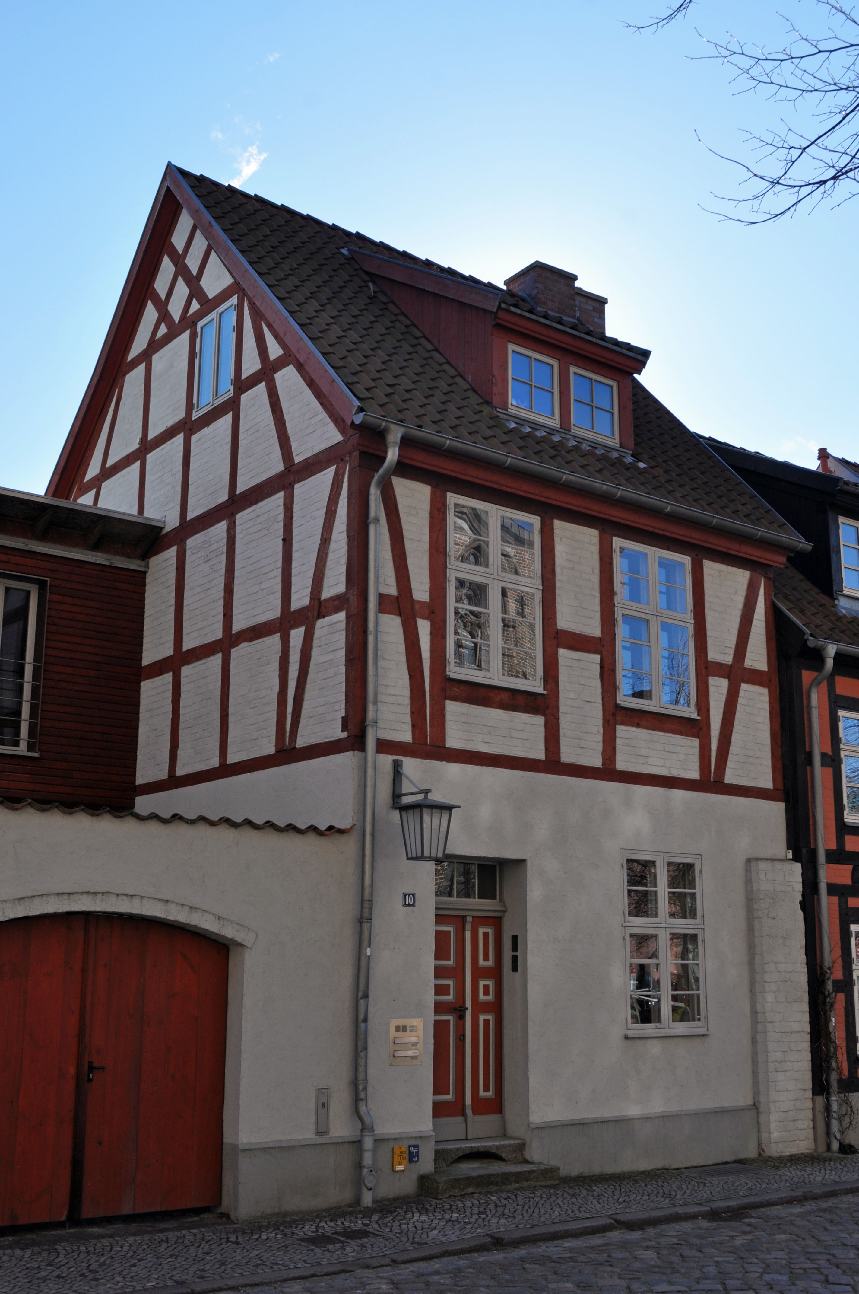 Gebäude bzw. Gebäudedetail in Stralsund. Straße und Hausnummer siehe Dateiname. Das Gebäude ist als Baudenkmal ausgewiesen, siehe dazu die Liste der Baudenkmale in Stralsund.